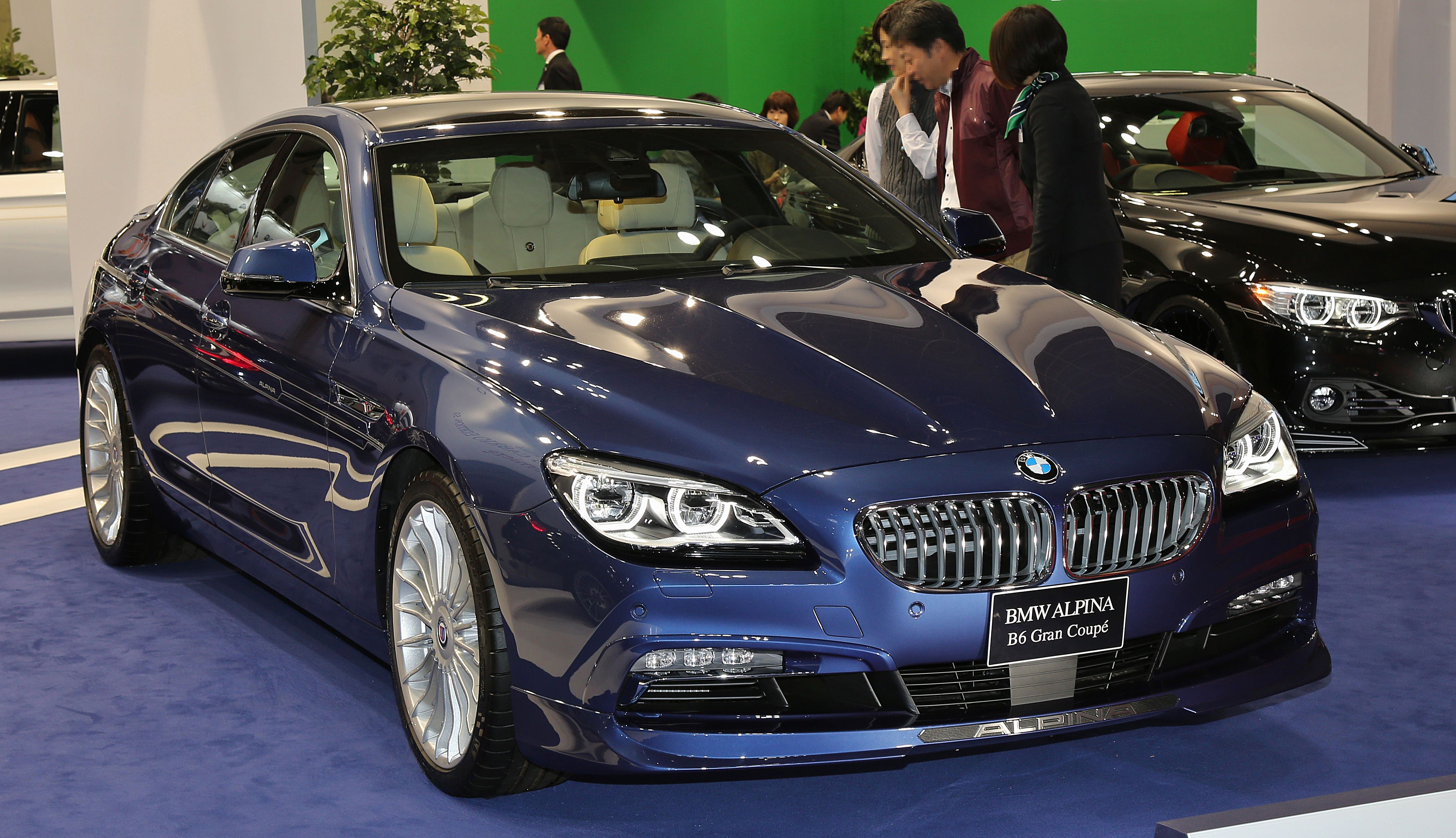 Alpina B6 Gran Coupe